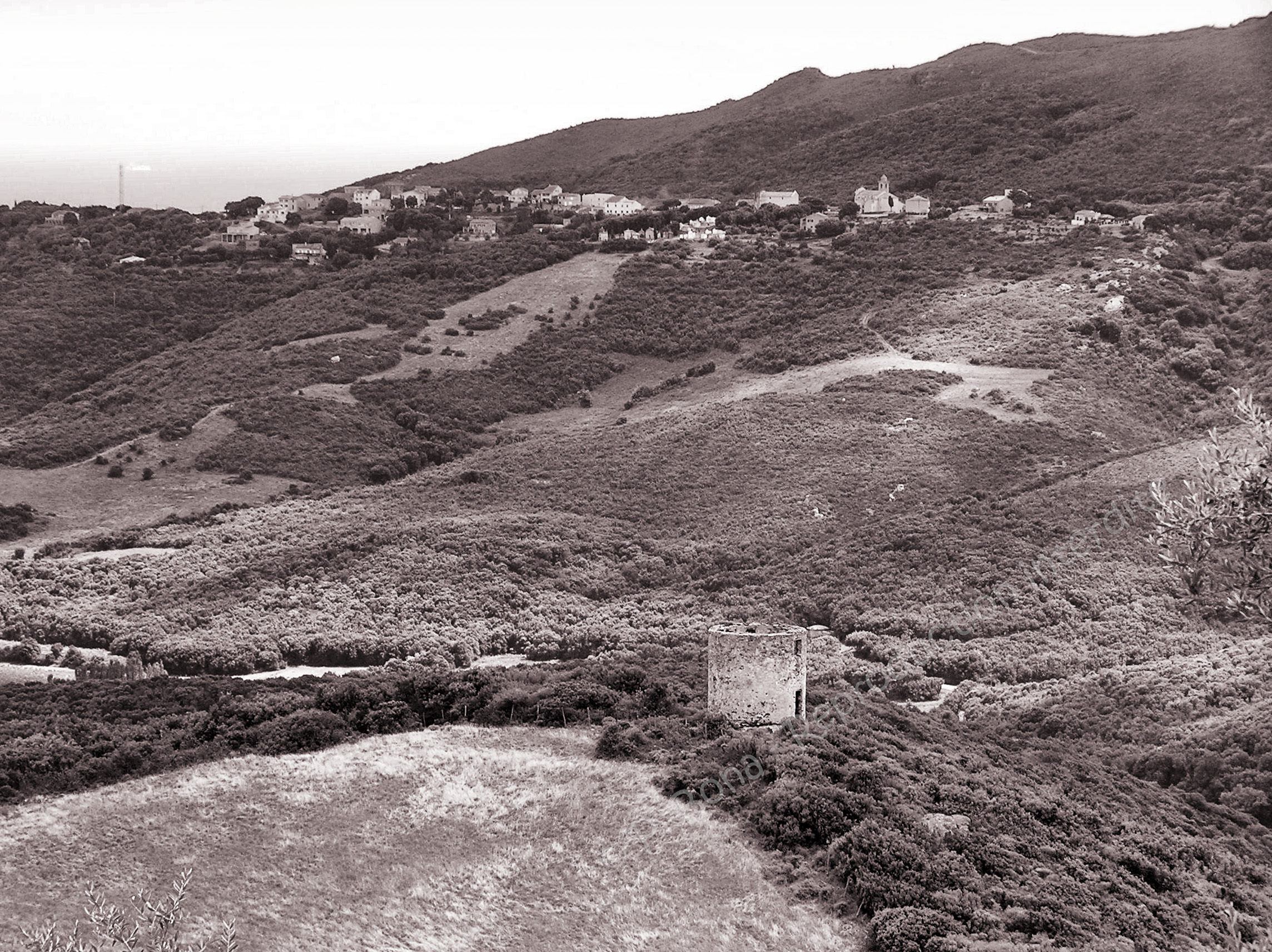 Rogliano, Cap Corse - Ancien moulin de San Bernardino. En arrière-plan, le village de Tomino